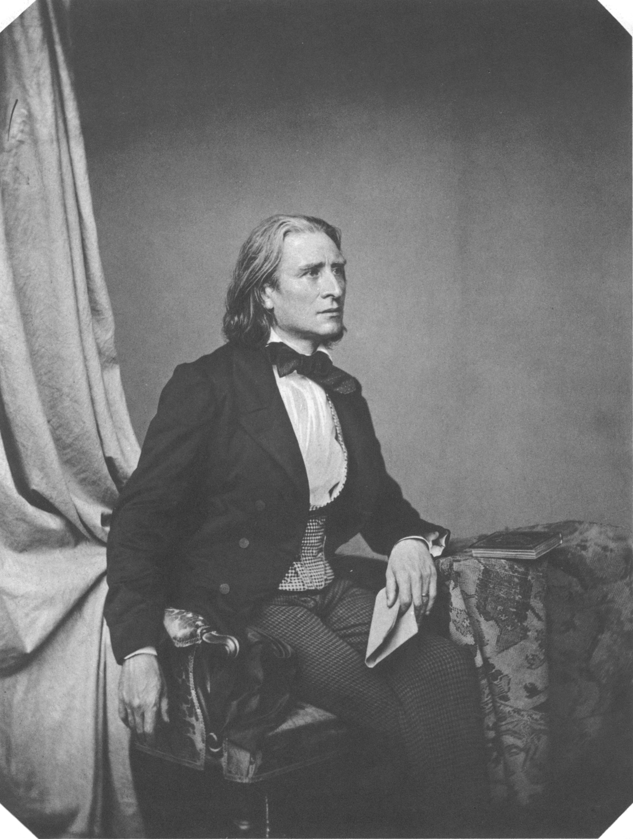 Franz Liszt (1811-1886)